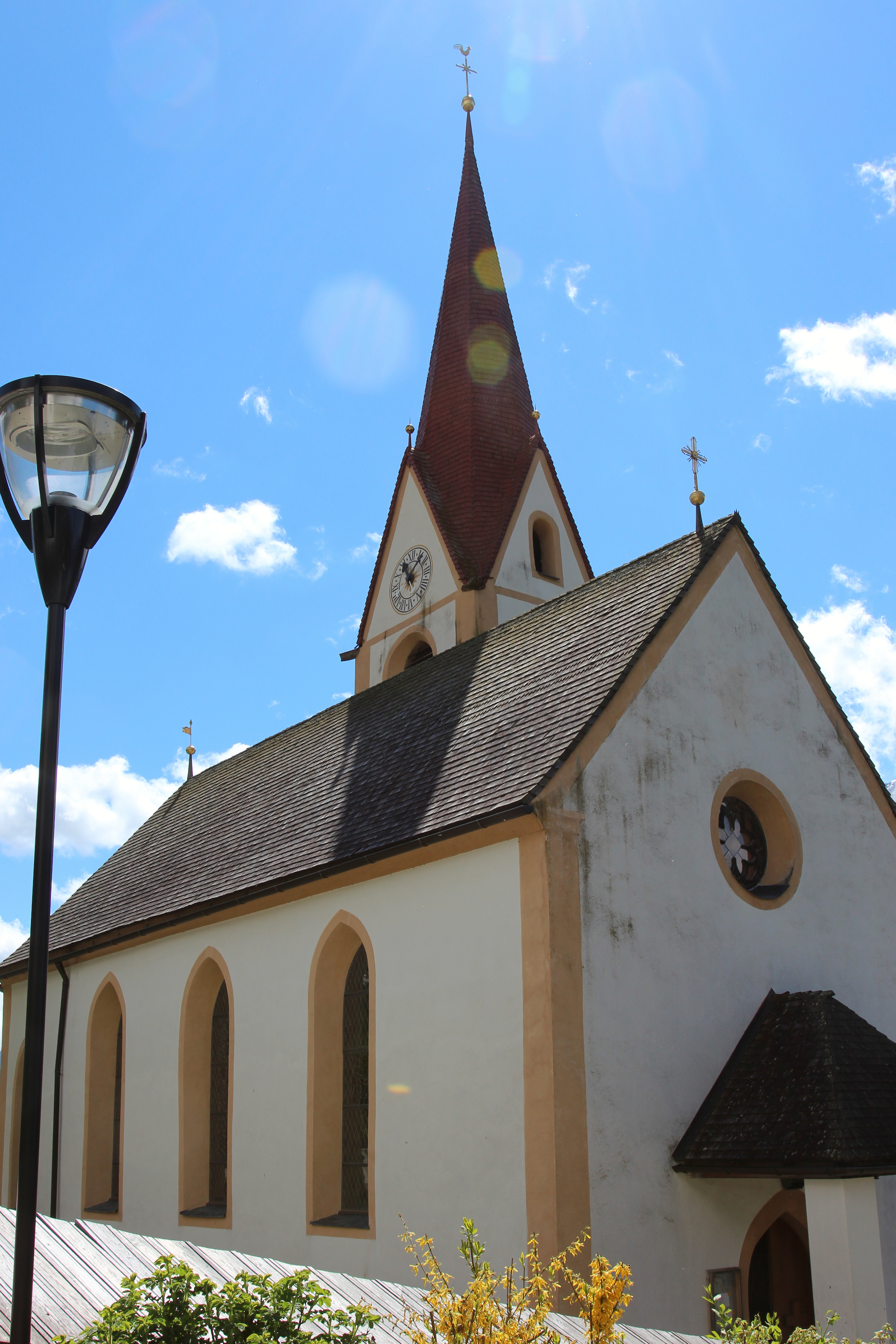 Expositurkirche St. Martin in Bannberg, Gemeinde Assling, Osttirol, Österreich.